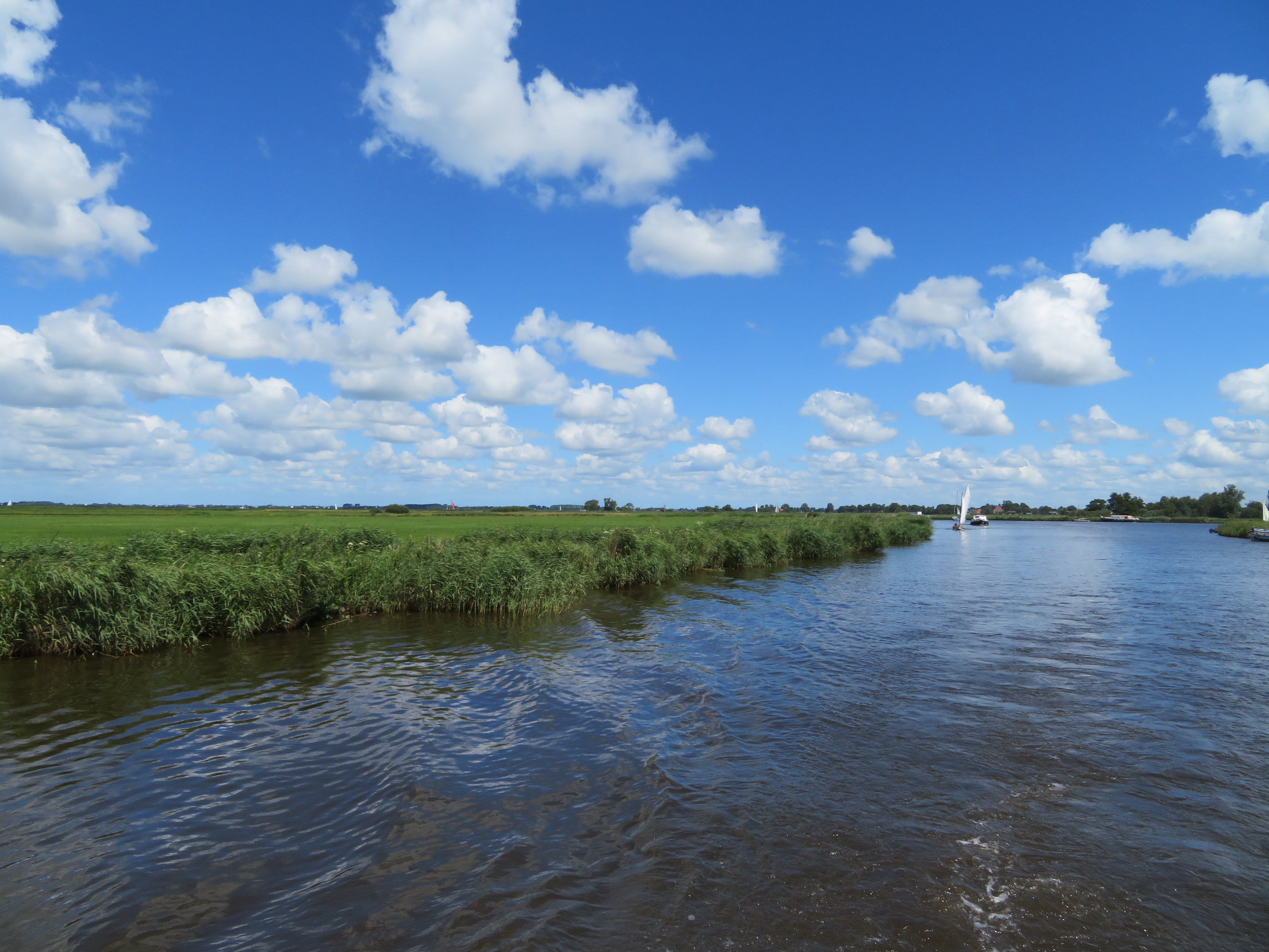 De Noorder Oudeweg is een kanaal in Friesland tussen de Goëngarijpsterpoelen (Goaiïngarypster Puollen) aan de noordzijde en de Langweerderwielen (Langwarder Wielen) in het zuiden.